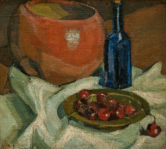 Naturaleza muerta. Mantel, jarrón, botella y plato con cerezas. Universidad de Concepción